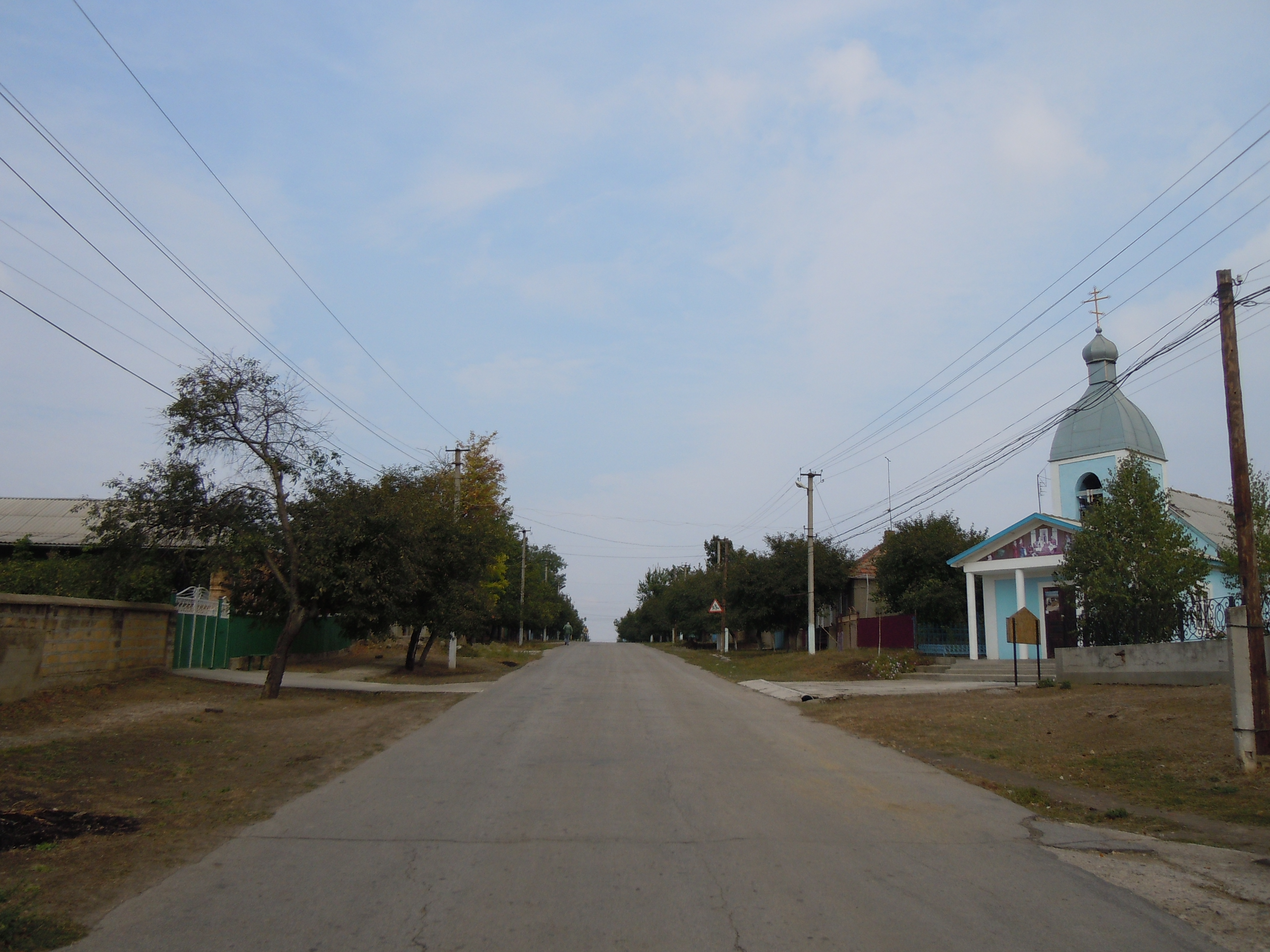 Вулиця села Каракурт, Болградський район, Одеська область